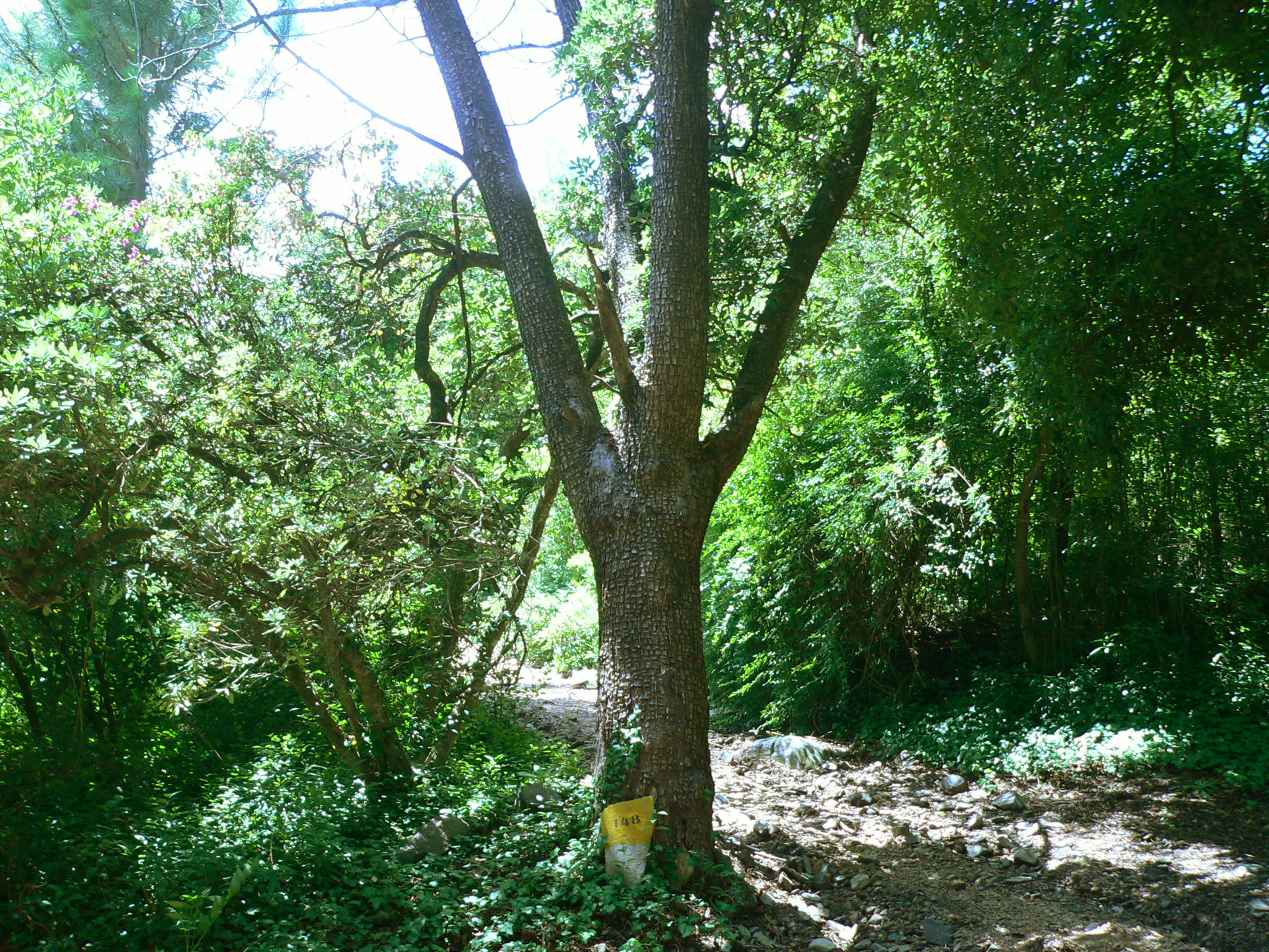 Juniperus depeana con poco follaje